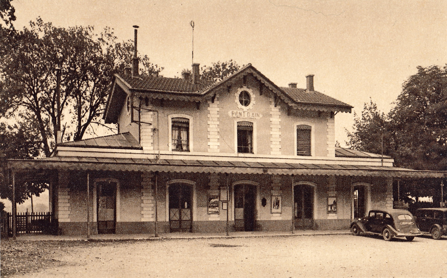 Carte postale ancienne éditée par Braun n°CA 485 : PONT D'AIN - La Gare